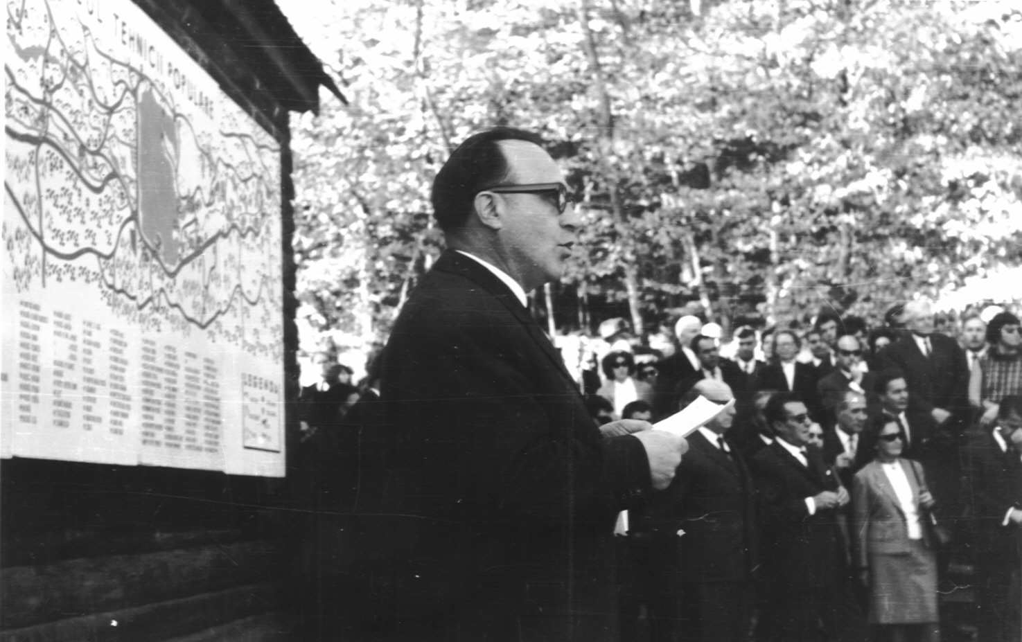 Cornel Irimie, etnograf român, 1919-1983.